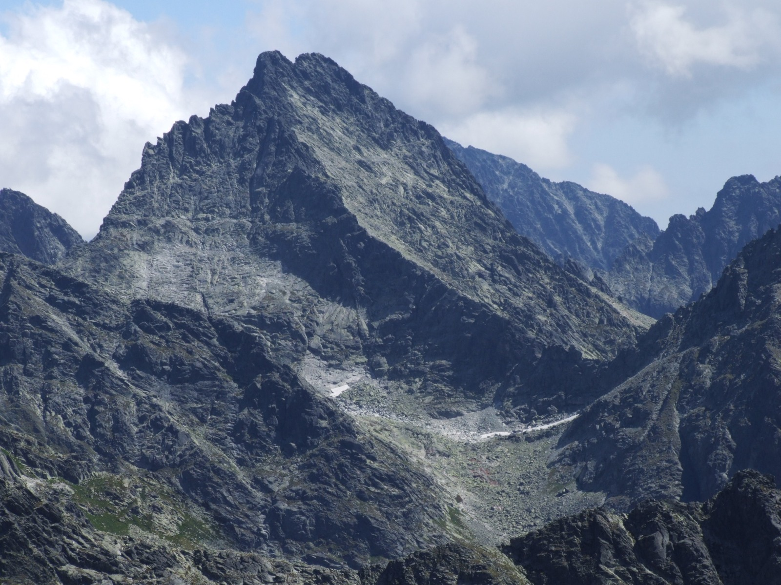 Wysoka